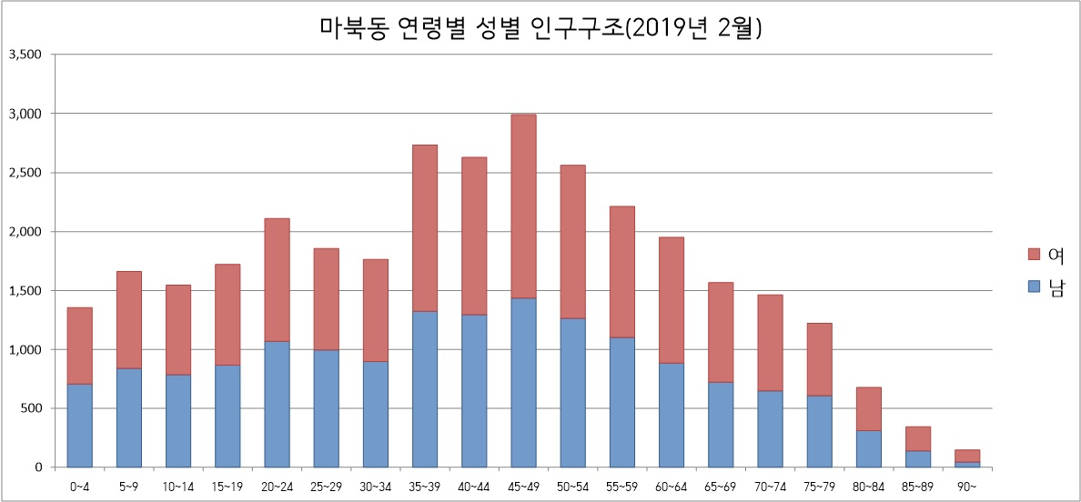 마북동 인구통계(2019년 2월)